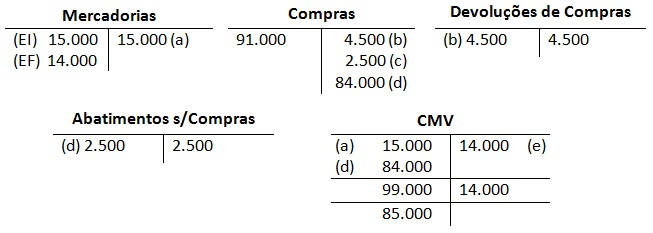 Exemplo retirado do livro para fins acadêmicos, Todos os direitos reservados